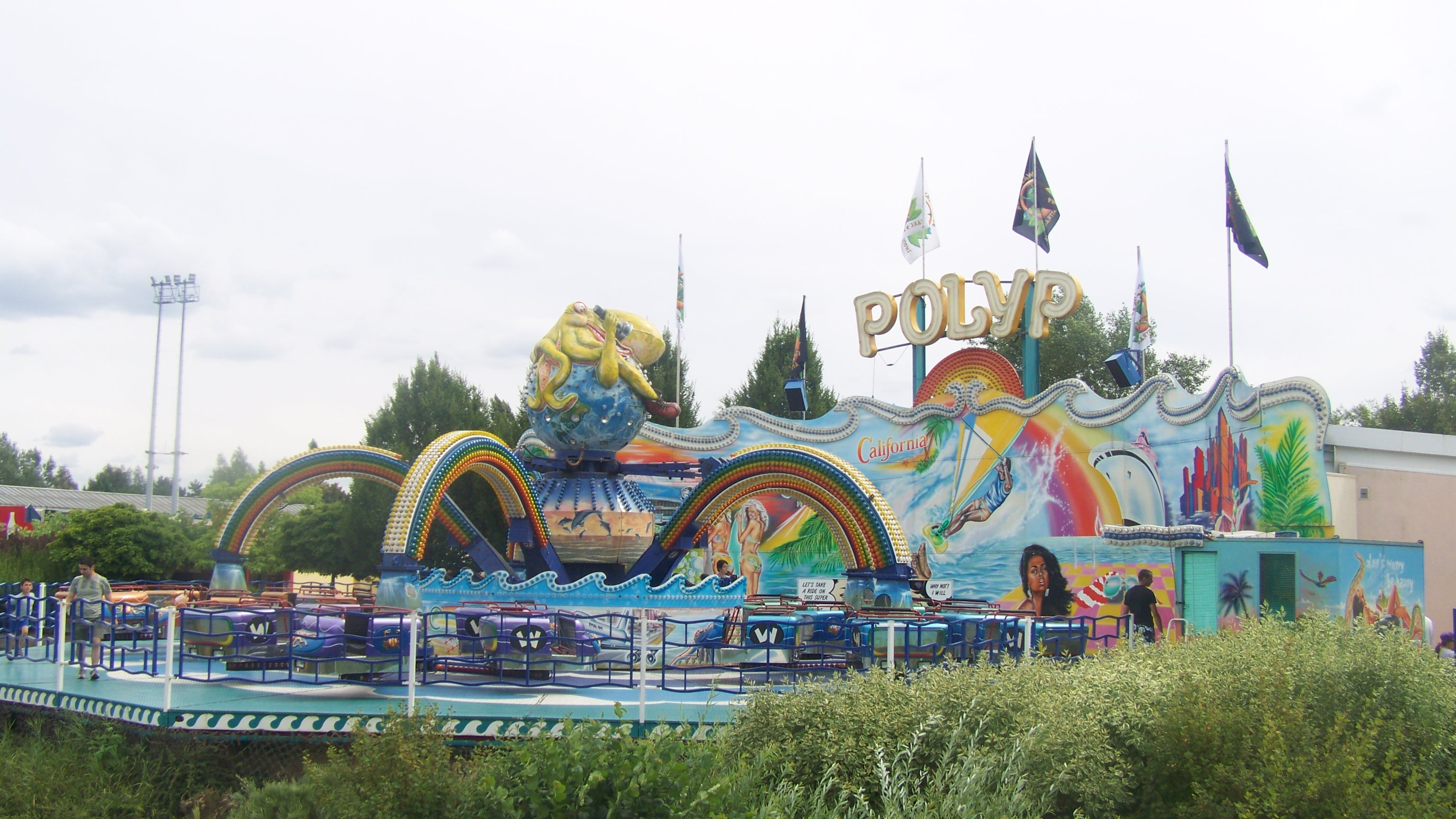 Polyp a Walygator Parc